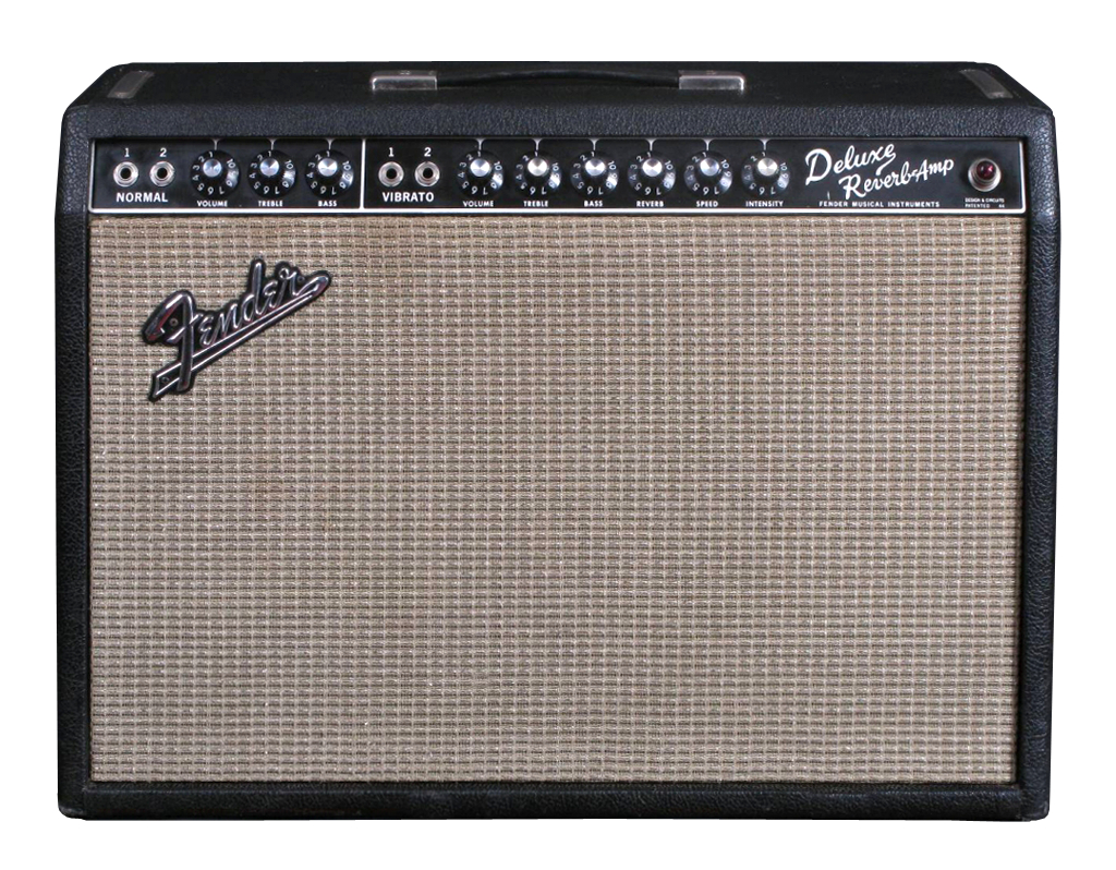 Fender Guitar Amplifier - 1965 Deluxe Reverb